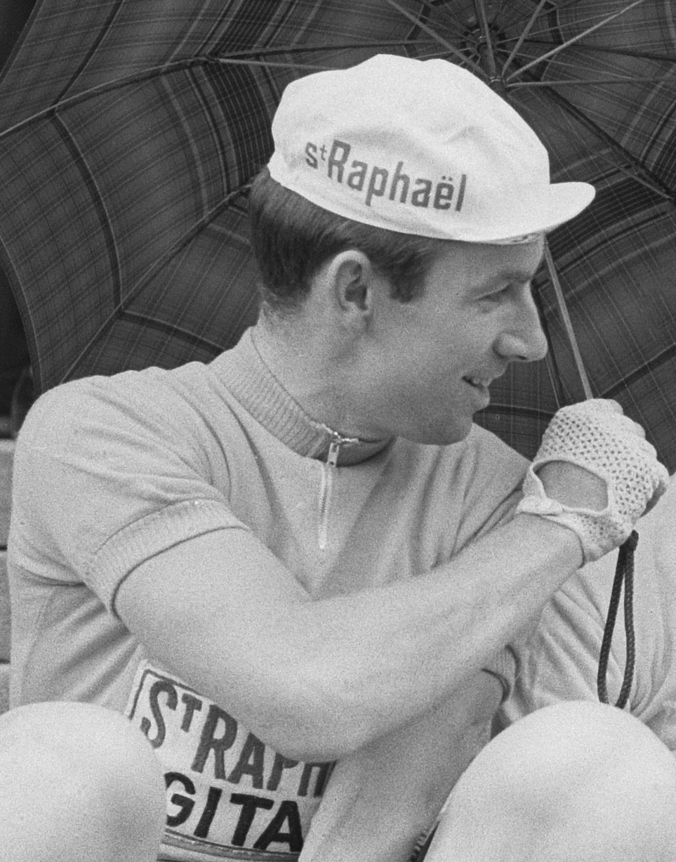 Nationaal Archief Beschrijving: Voor de start. Seamus Elliott Datum 27 juni 1963 Bestanddeelnummer 915-3084 Vervaardiger: Anefo / Harry Pot (1929–1996) DescriptionDutch photographer and cinematographerDate of birth/death 1929 1996Work location Amsterdam, BentveldAuthority control : Q27877051 VIAF: 284191334 ISNI: 0000 0003 9050 874X Koninklijke: 073478326 creator QS:P170,Q27877051 URL: Voor meer informatie over het Nationaal Archief: Voor meer foto's uit deze en andere collecties, bezoek onze Beeldbank:, U kunt ons helpen onze kennis van de fotocollecties te verrijken door tags en commentaren toe te voegen. Herkent u mensen of locaties of heeft u een bijzonder verhaal te vertellen bij één van de foto's, laat dan een reactie achter (als u ingelogd bent bij Flickr) of stuur een mailtje naar